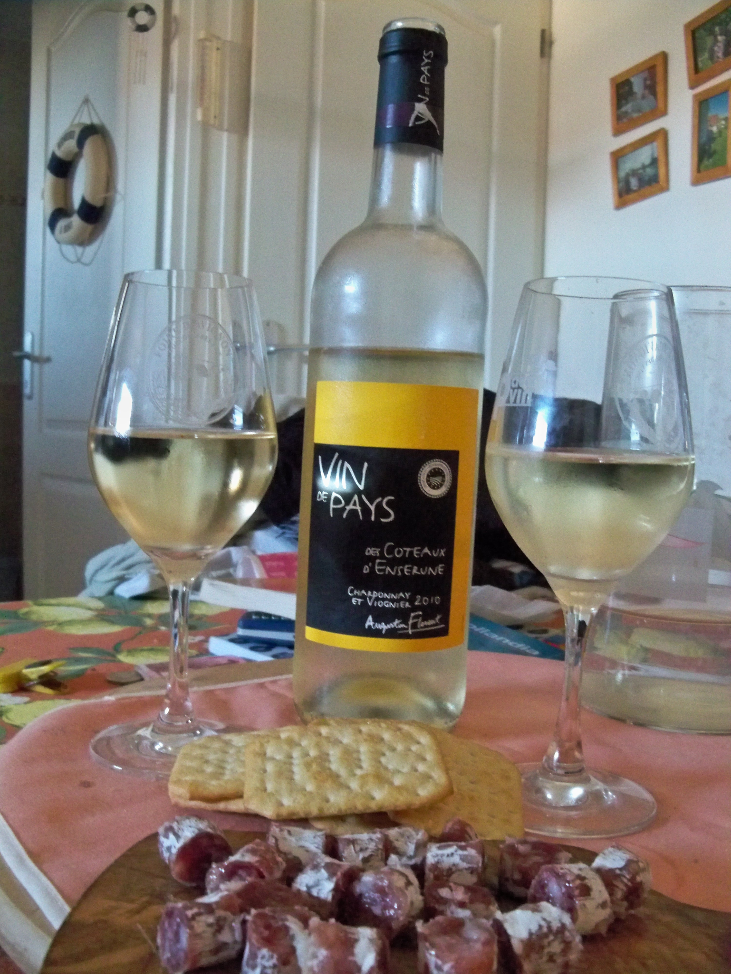 Vin de Pays de l'Hérault (34)